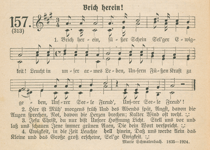 Notensatz zum Lied "Brich herein .." in Volkening / Rische: Kleine Missionsharfe im Kirchen und Volkston, Bertelsmann Gütersloh 1925, 82. Auflage, Seite 126